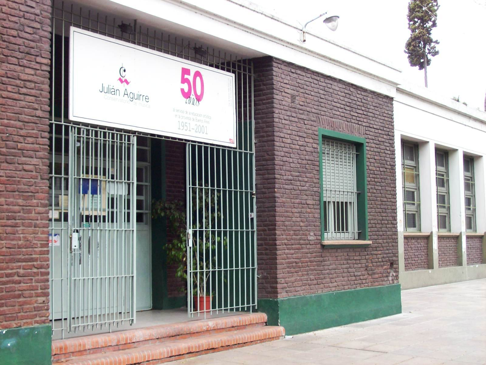 Frente del Conservatorio Julián Aguirre, Institución musical oficial fundada por Alberto Ginastera en 1951 y dedicada a la enseñanza de Instrumentos musicales, canto, Educación Musical, Dirección Coral y Composición.